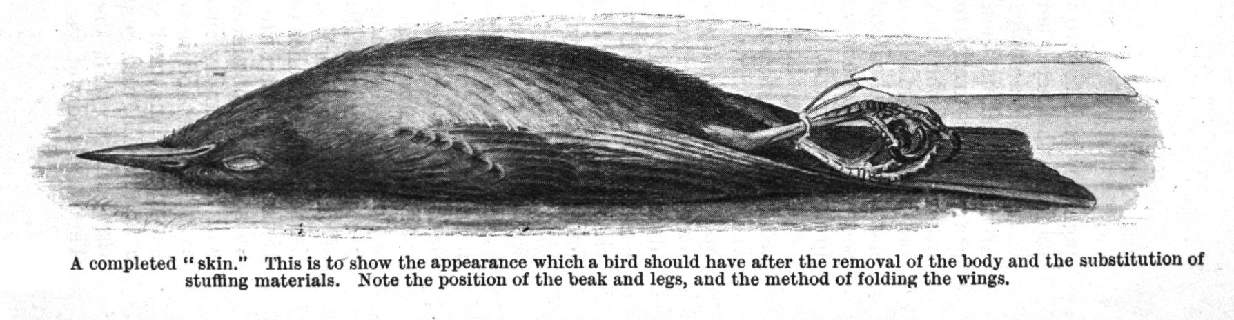 partly skinned bird